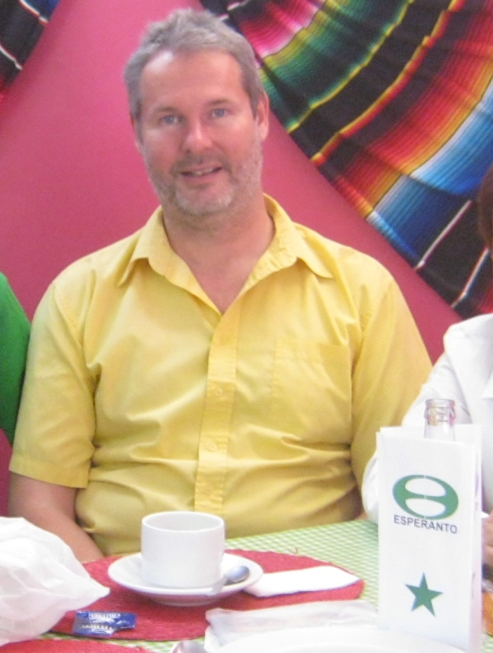 Martin Schäffer, Esperantista alemán y secretario general de la Asociación Universal de EsperantoEsperanto: Martin Schäffer, germana Esperantisto kaj ĝenerala sekreario de UEA.